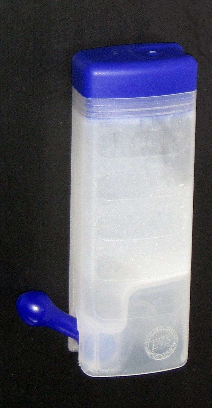 picture